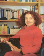 Kriemhild Buhl (auch: Krimi Buhl, Maxi Buhl).